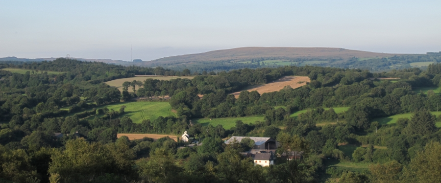 Le "village" de Bodingar Bihan. Les cultures entre Bodingar et Lann ar marrou. Au fond, le "Tuchenn Kador (parfois appelé "Signal de toussaines".